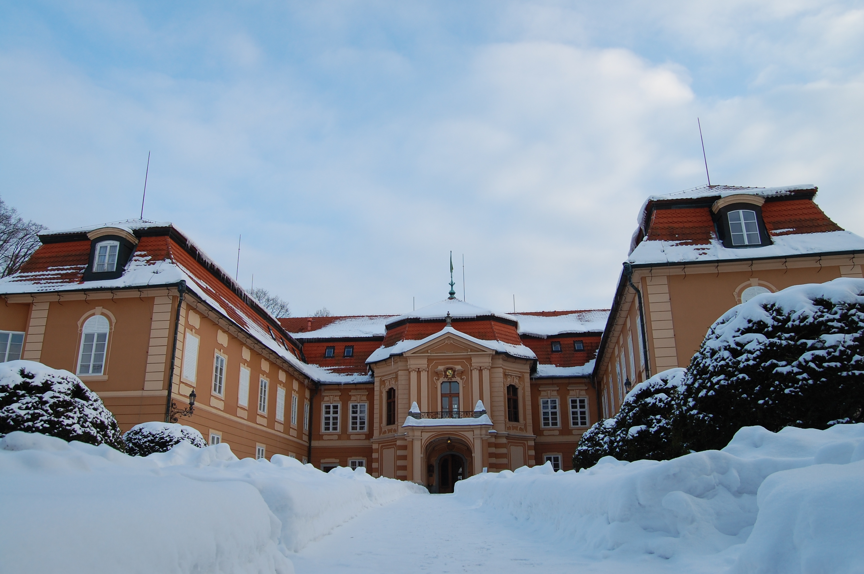 Zámek Štiřín, Štiřín 711